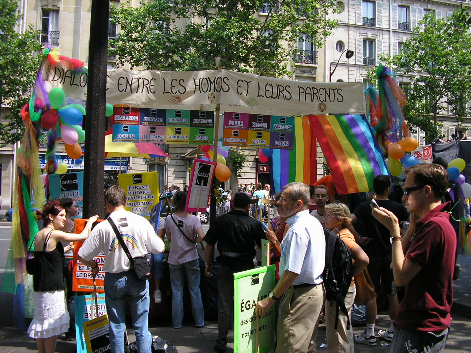 Paris : Association Contact à la Gay Pride 2005.